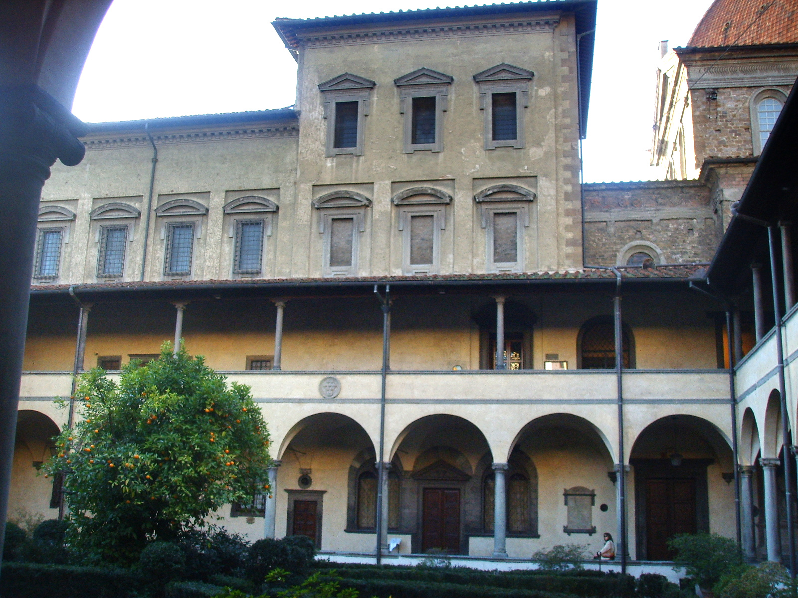 Biblioteca_medicea_laurenziana_dal_chiostro_di_san_lorenzo